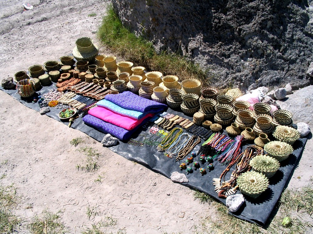 Artesanía taraumara ofrecida a los turistas en la reserva aborigen en Chihuahua, México.